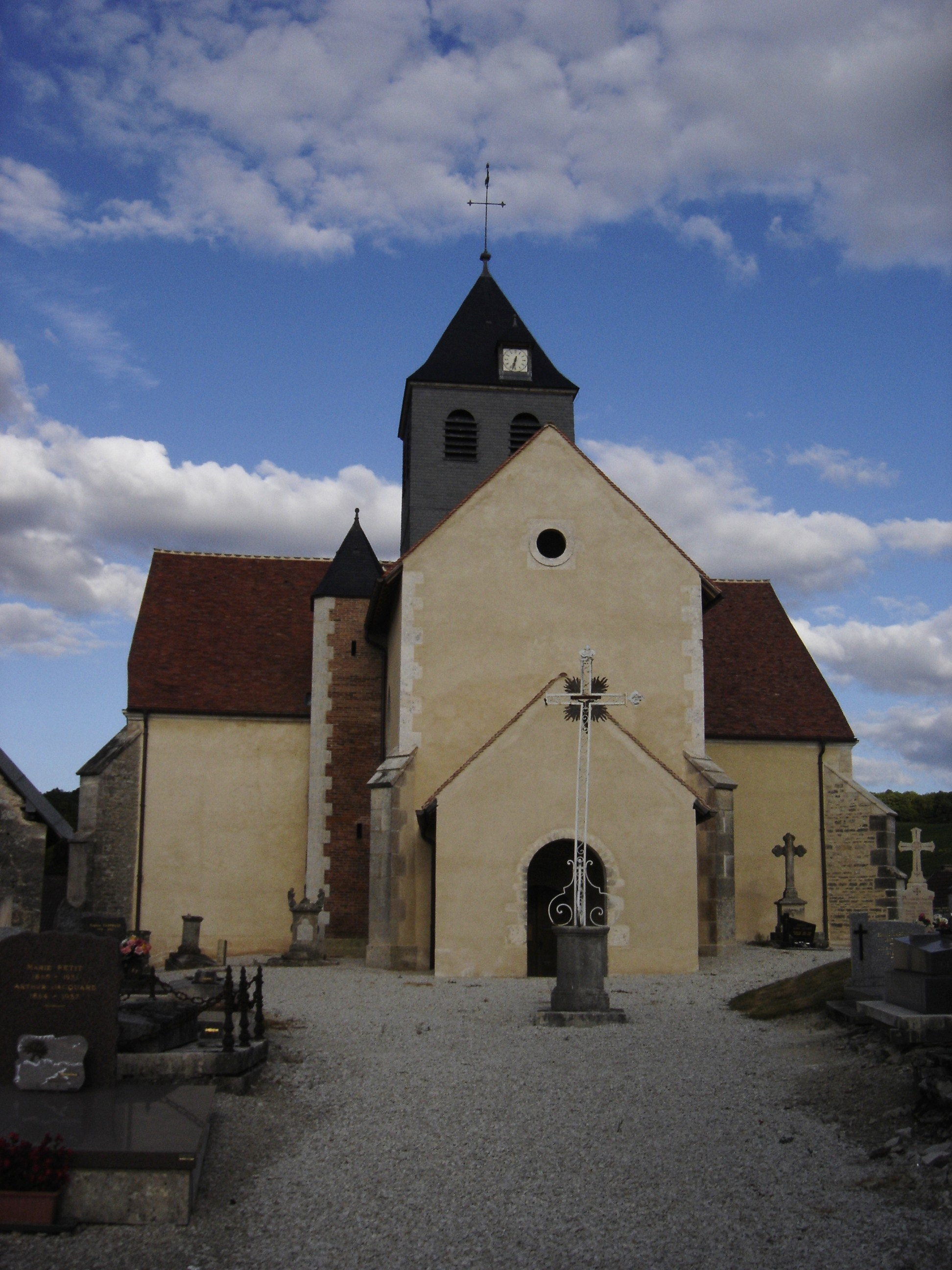 église de Chervey - Aube - France